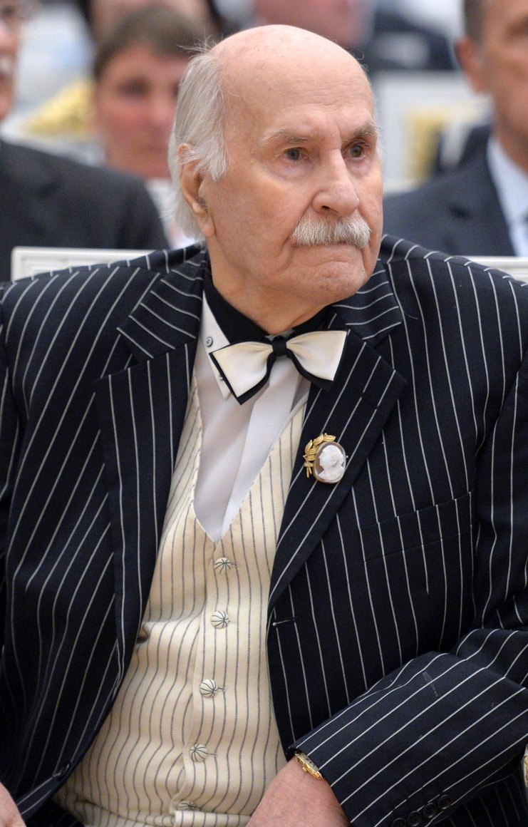 Владимир Зельдин на церемонии награждения. Москва, Кремль. 21 мая 2015